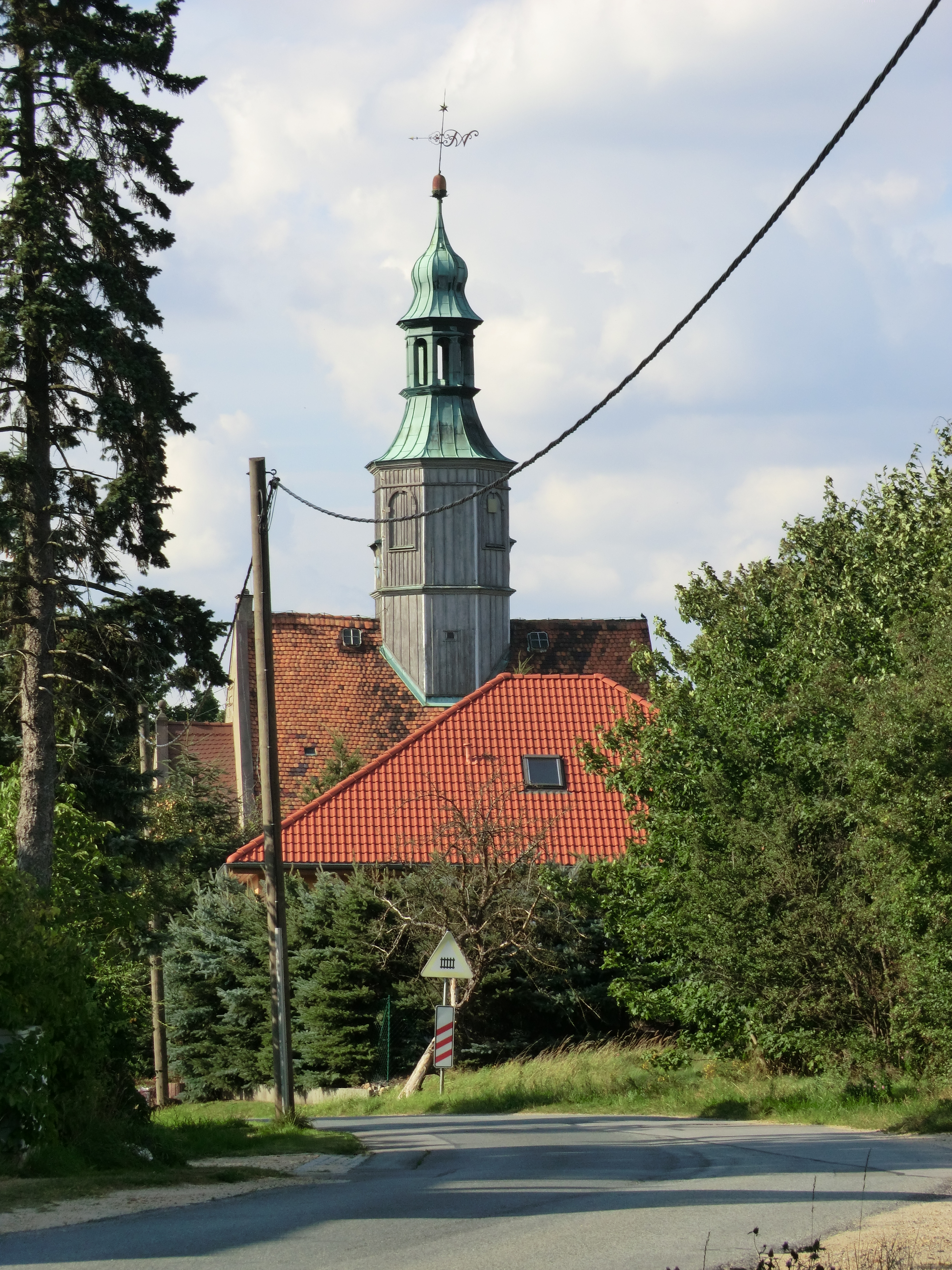 Kirchturm der Kirche von Gersdorf (Gemeinde Markersdorf) bei Görlitz